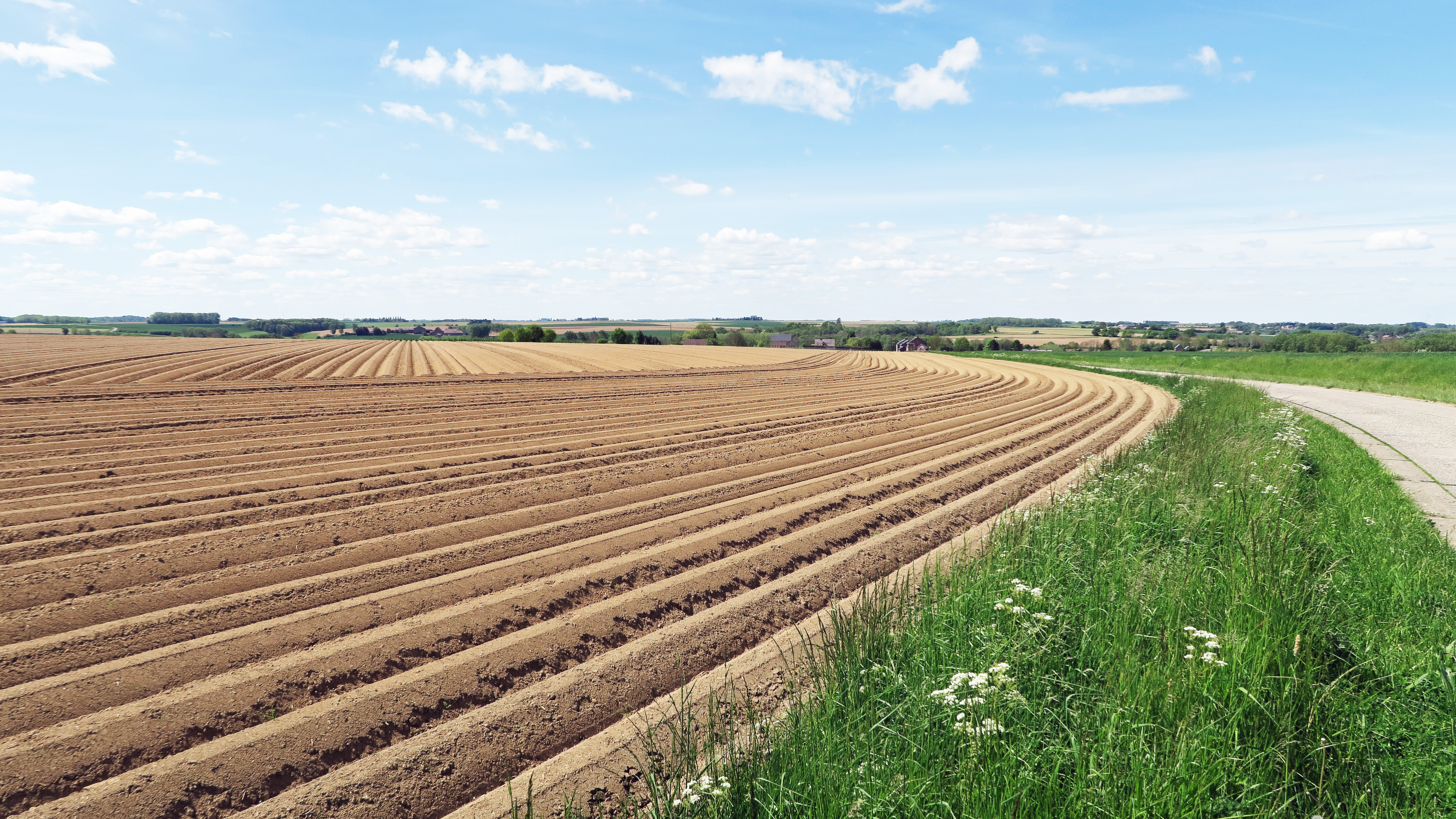 Préparation d'un champ à la culture de pommes de terre